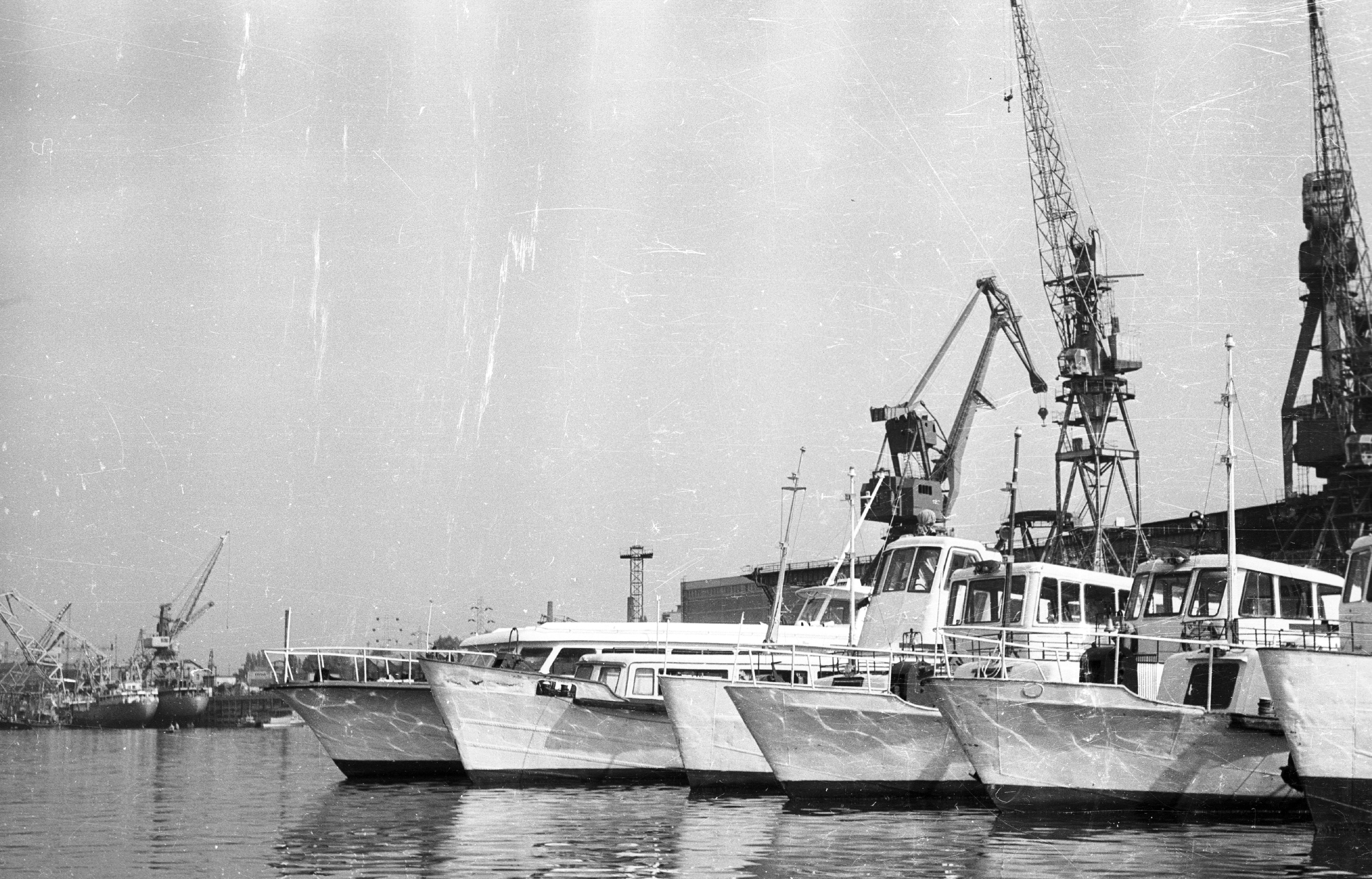 Újpesti-öböl, a Magyar Hajó- és Darugyár Angyalföldi Gyáregysége, szerelő partfal vége a Meder utca felé. TÁPÉ 100 típusú átkelőhajók. Location: Hungary, Budapest XIII. Tags: ship, crane, shipbuilding industry, Hungarian brand, Budapest, water bus Title: Újpesti-öböl, a Magyar Hajó- és Darugyár Angyalföldi Gyáregysége, szerelő partfal vége a Meder utca felé. TÁPÉ 100 típusú átkelőhajók.